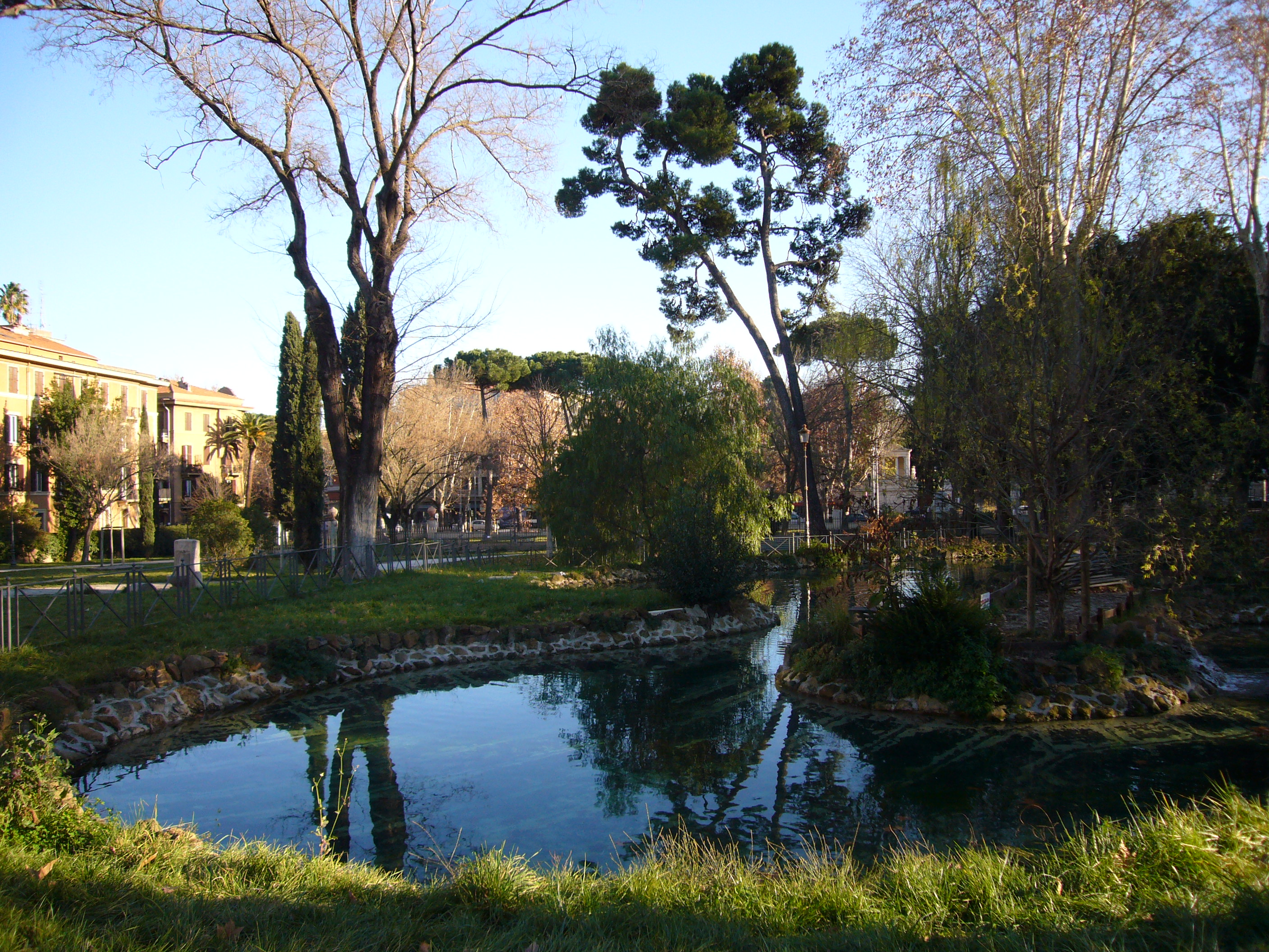 Roma, villa Paganini